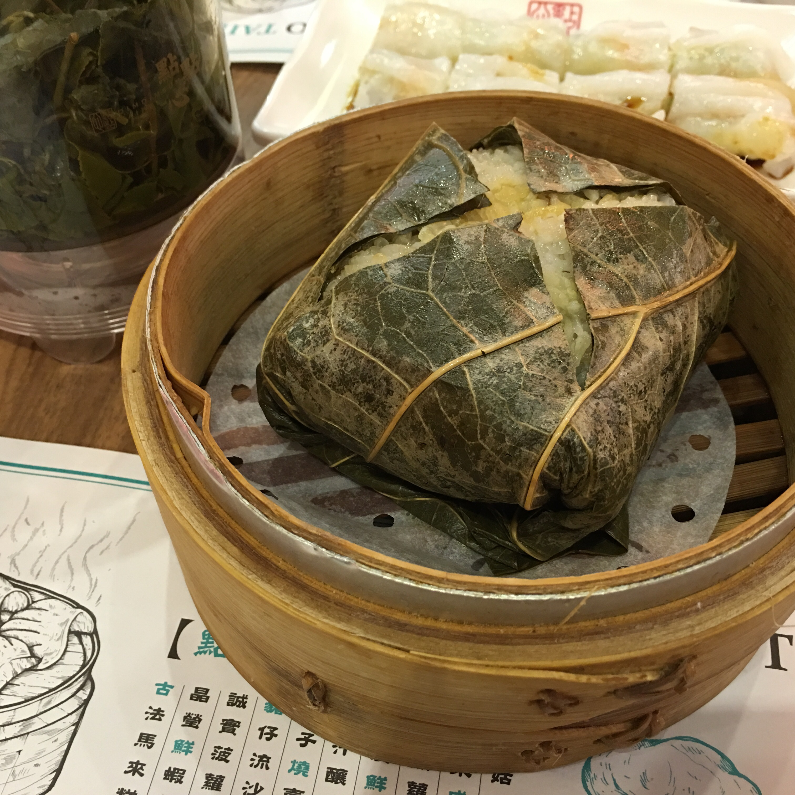 懷舊糯米雞, 點點心, Dimdimsum, 台北